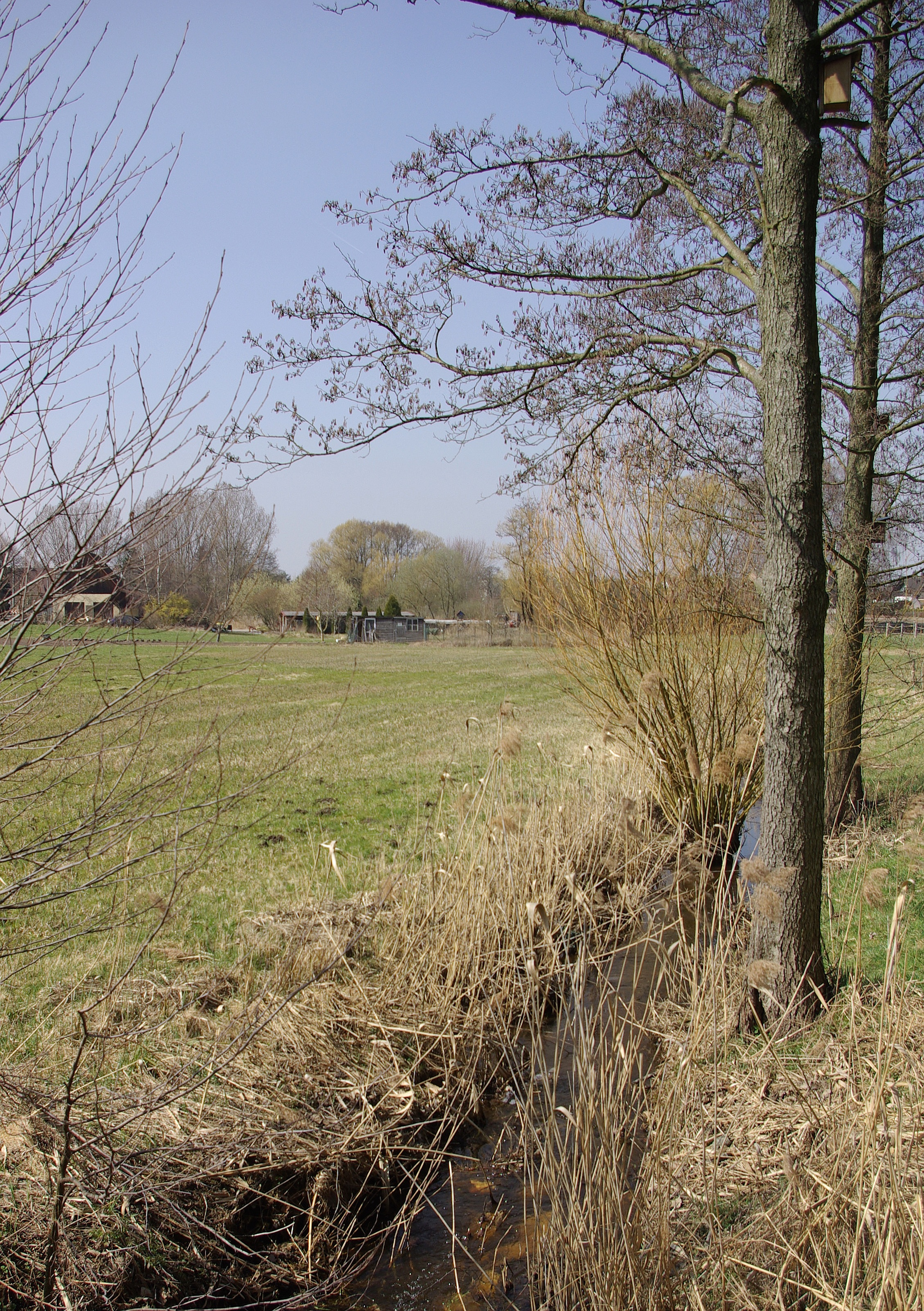 Der Hutgraben im Erlanger Stadtteil Tennenlohe